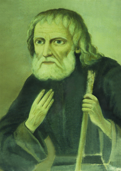 Преподобный Василиск Сибирский. Посмертный портрет.